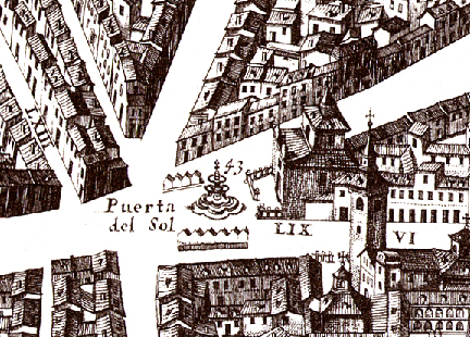 La Puerta del Sol según el plano de Teixeira, publicado en 1656. En el lado derecho, junto al Hospital del Buen Suceso, está esquemáticamente dibujada la fuente que popularmente se llamaría de La Mariblanca, inaugurada en 1630, coronada por la escultura de una alegoría de la Fe, según unos, o de la diosa Venus o de Diana, según otros, pero que no se distingue aquí. La fuente en cuestión, tras diversas reformas, fue desmontada en 1838.